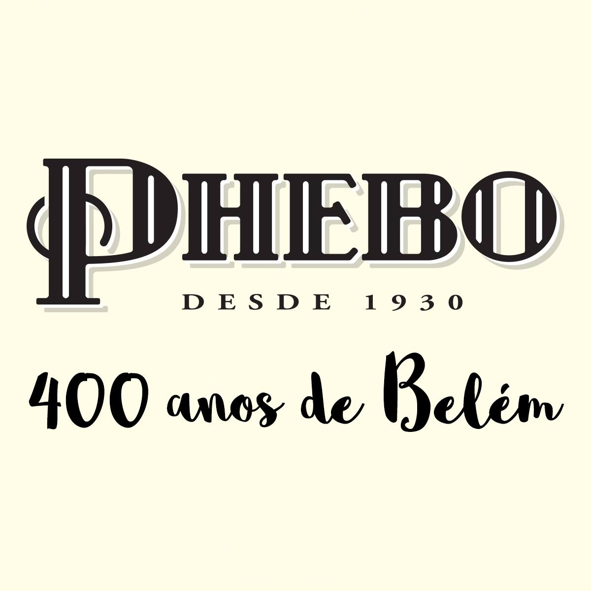 Perfumaria Phebo